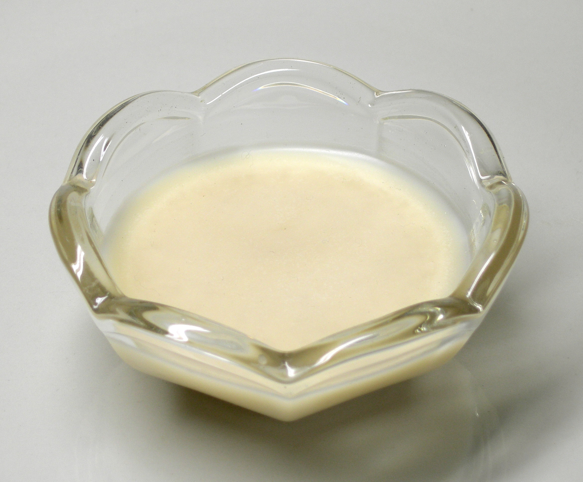 Bone marrow fat, (Knochenmarksfett)